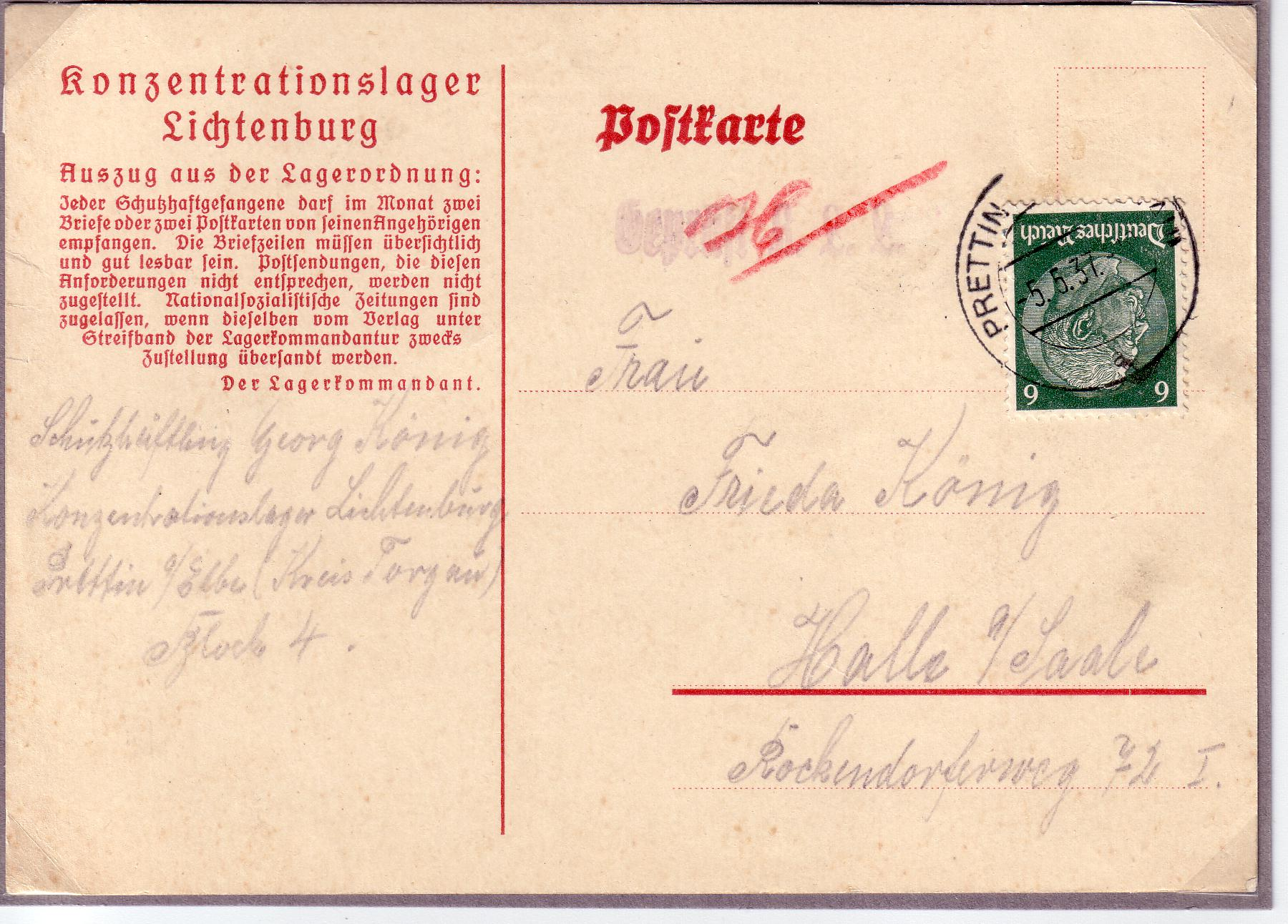 Postkarte eines Häftlings aus dem KZ Lichtenburg bei Prettin, Kr.Torgau von 1937 Poststempel: "Prettin (Kr.Torgau), 5.5.1937